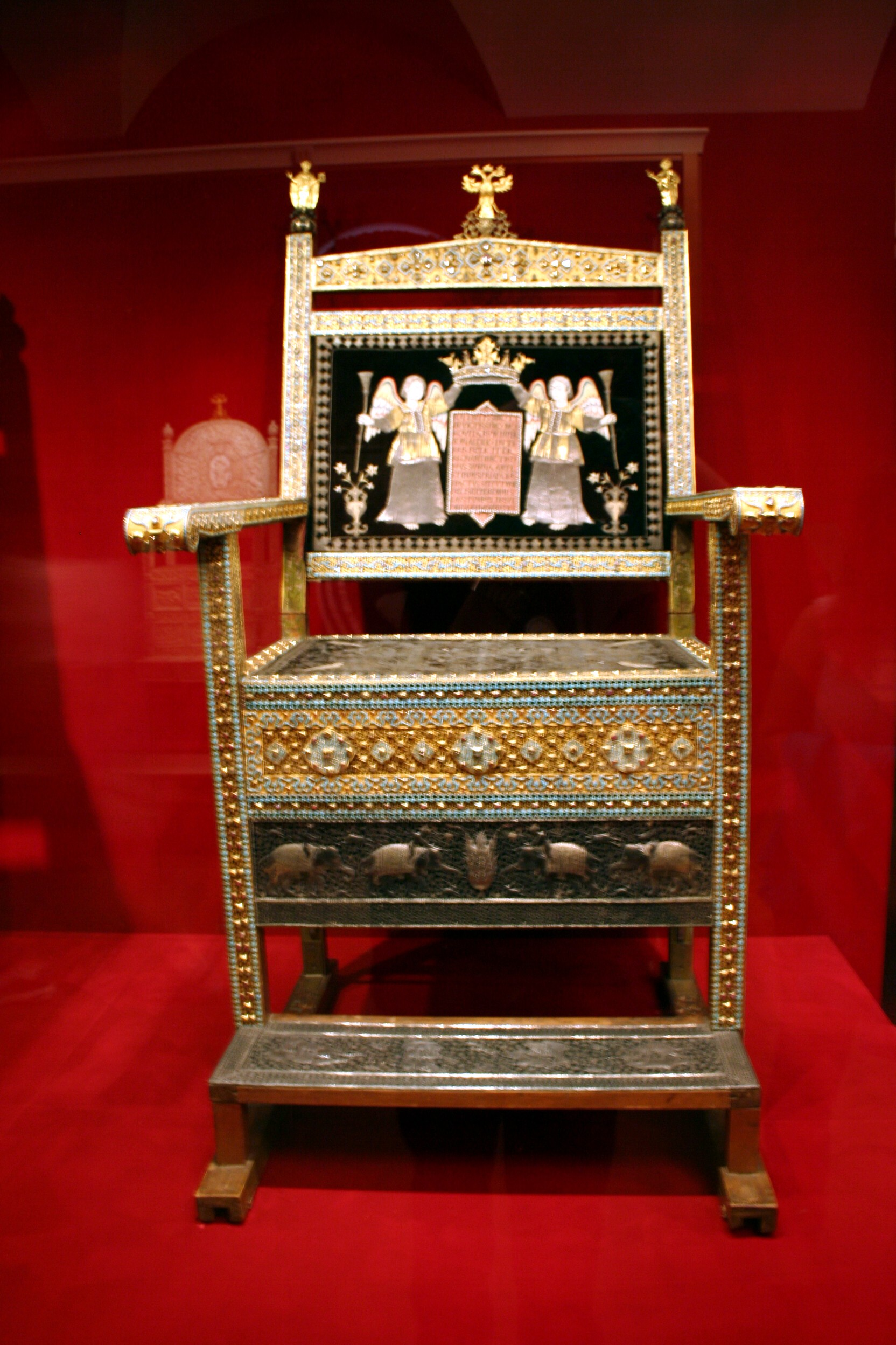 Museo de la Armería estatal, Oruzbeynaya palata, en el Kremlin. Trono del diamante de 1659 con 900 diamantes y turquesas